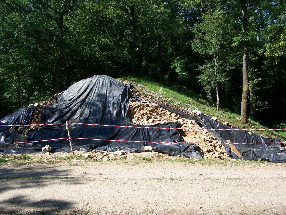 Oppidum de Boviolles, capitale des Leuques (département de la Meuse et la région Lorraine). Vue en coupe du mur de l'oppidum qui barre le plateau, depuis une des portes d'entrée